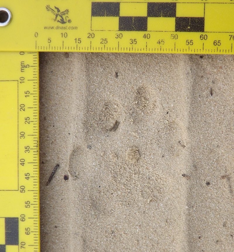 Huella delantera izquierda de lince ibérico